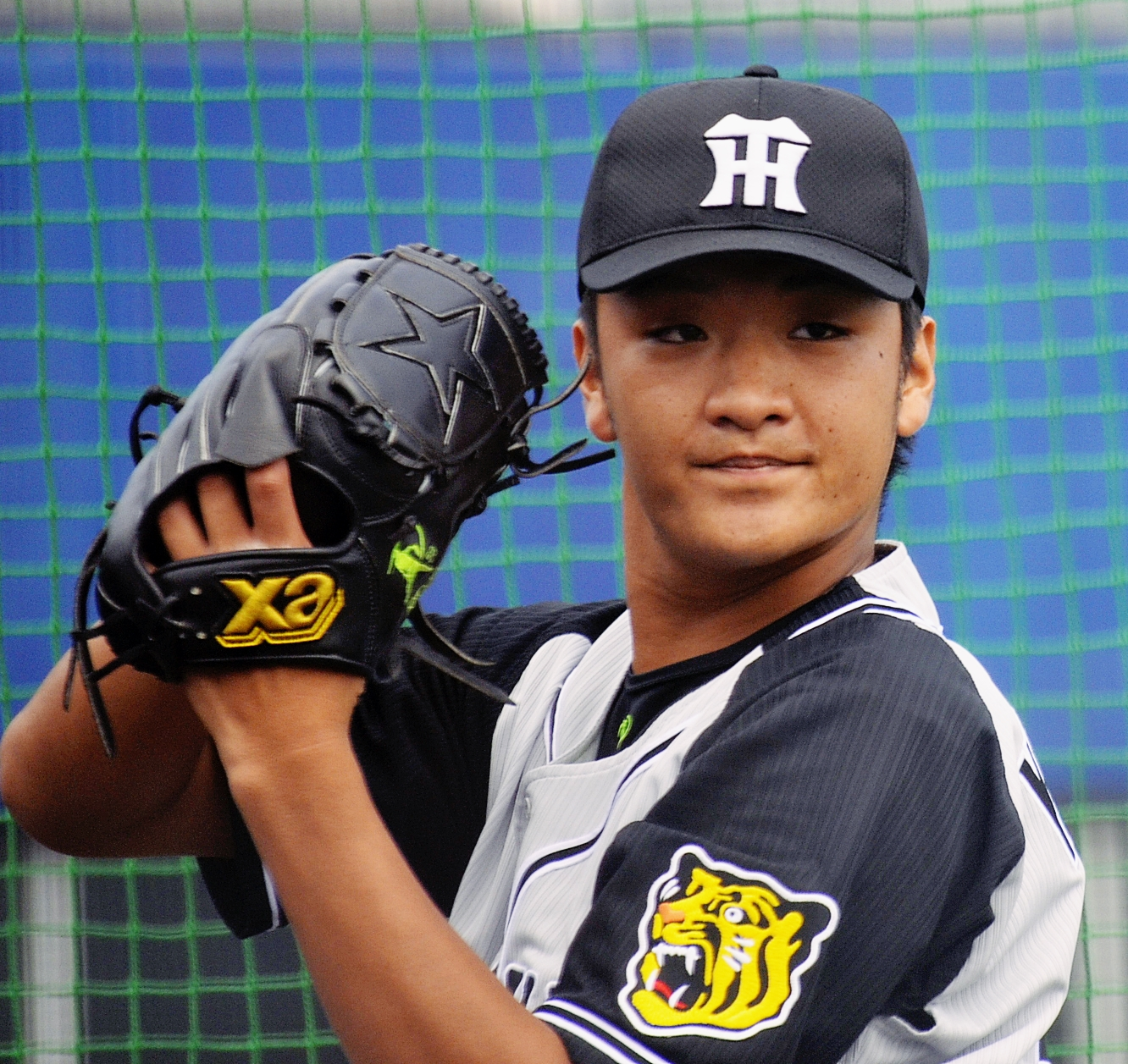 阪神タイガースの松田遼馬投手